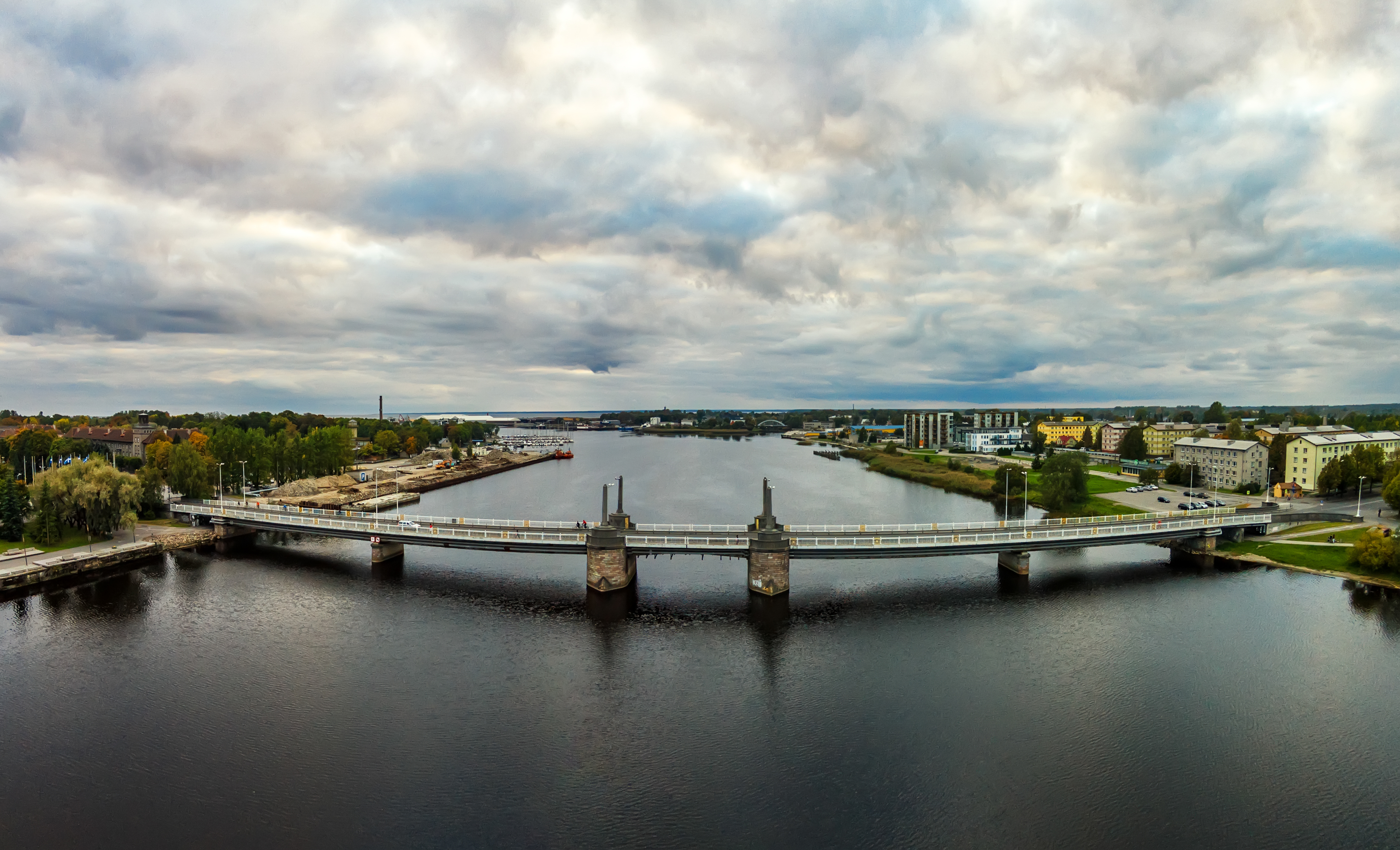 Pärnu kesklinna sild